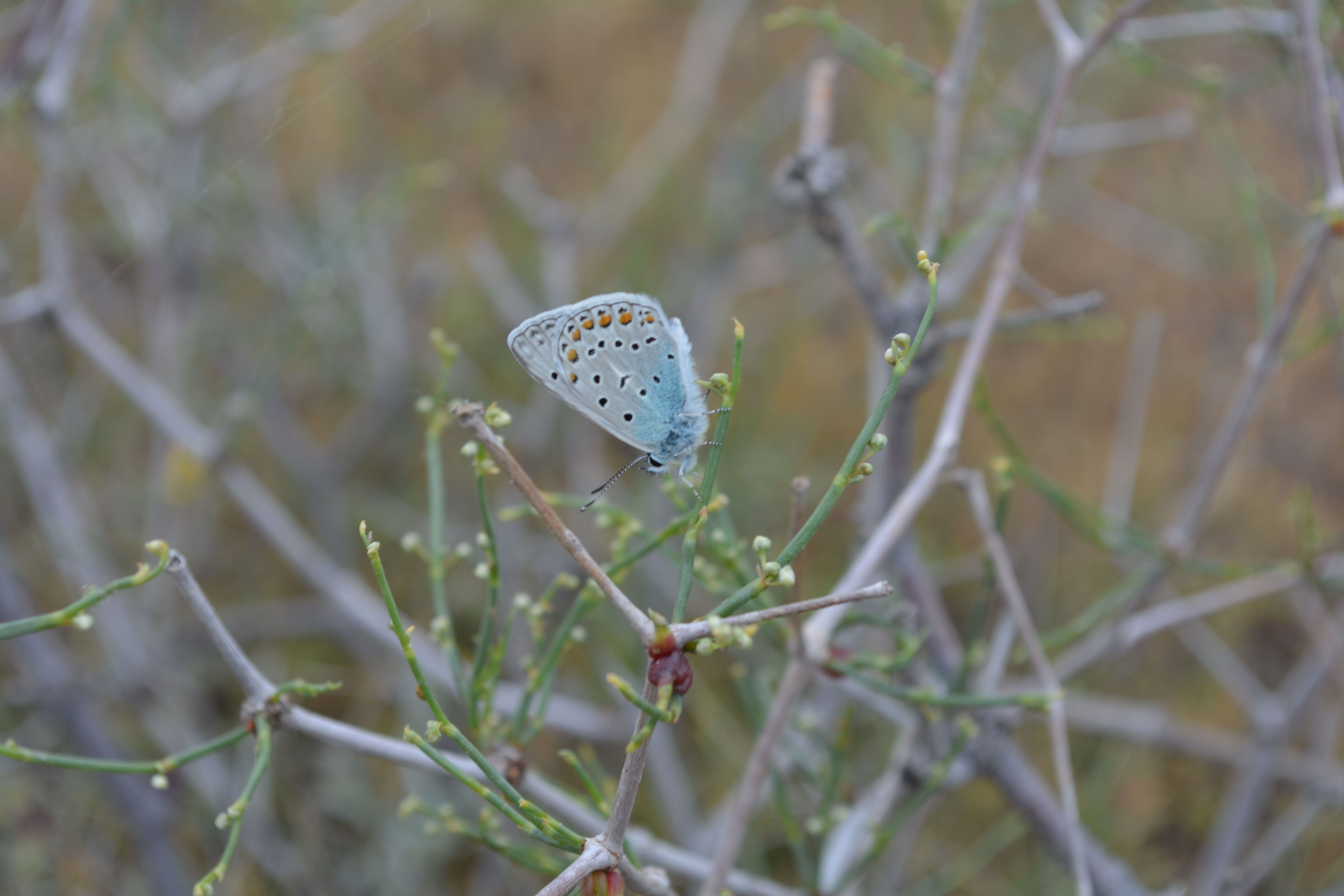 Գոռավանի ավազուտներ